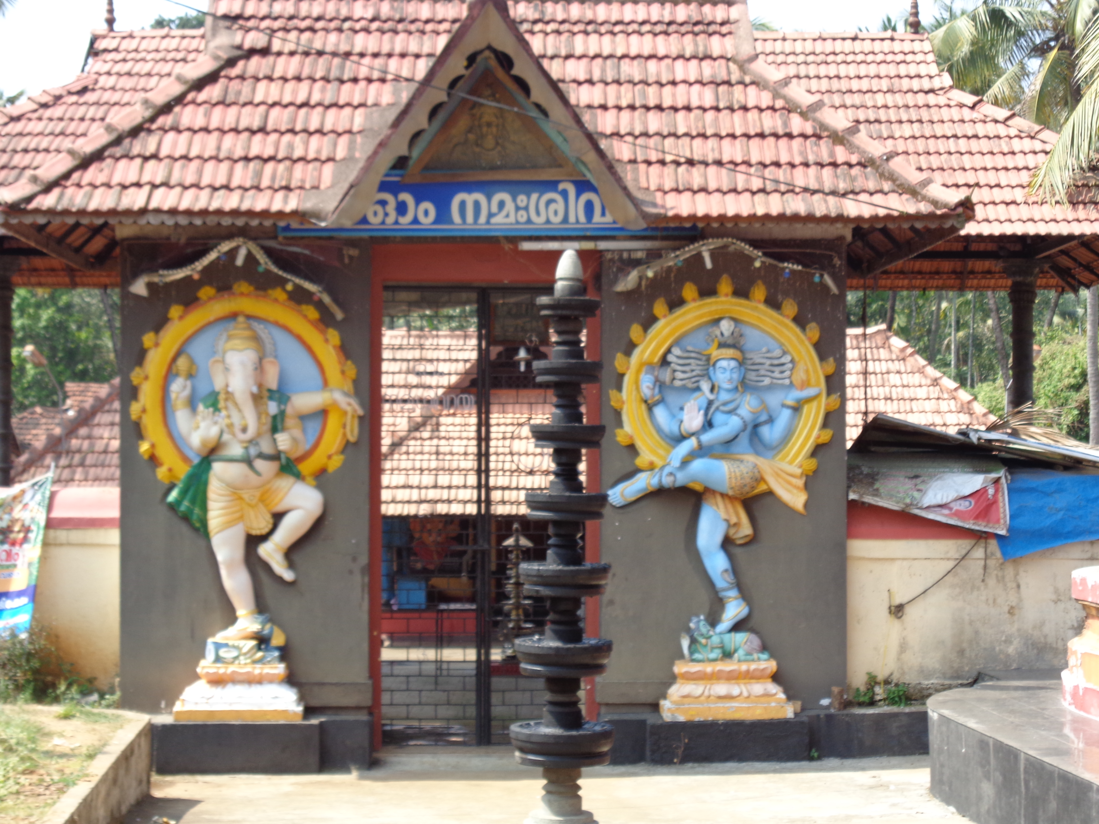 ക്ഷേത്രഗോപുരം